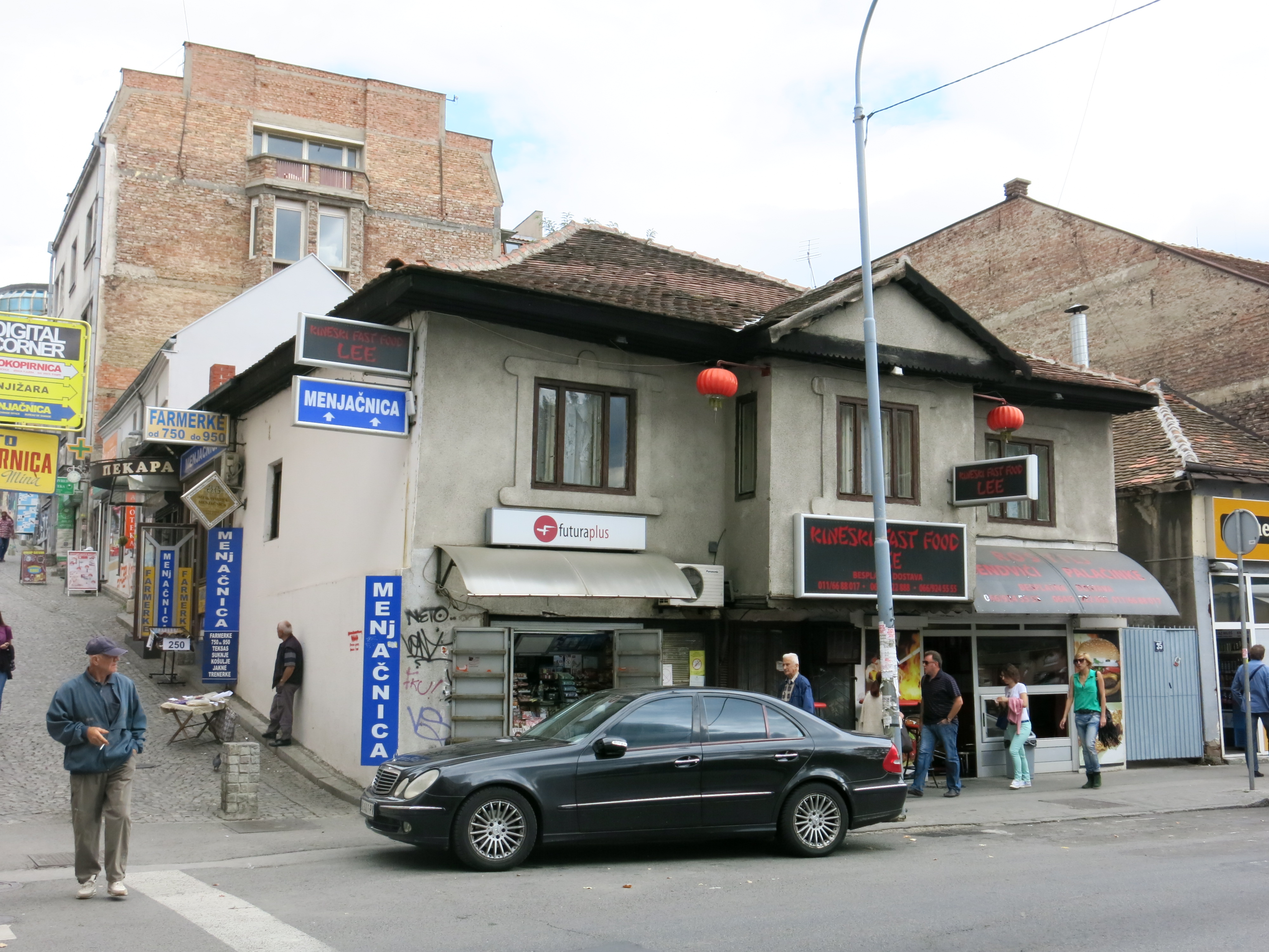 Кућа породице Најдановић